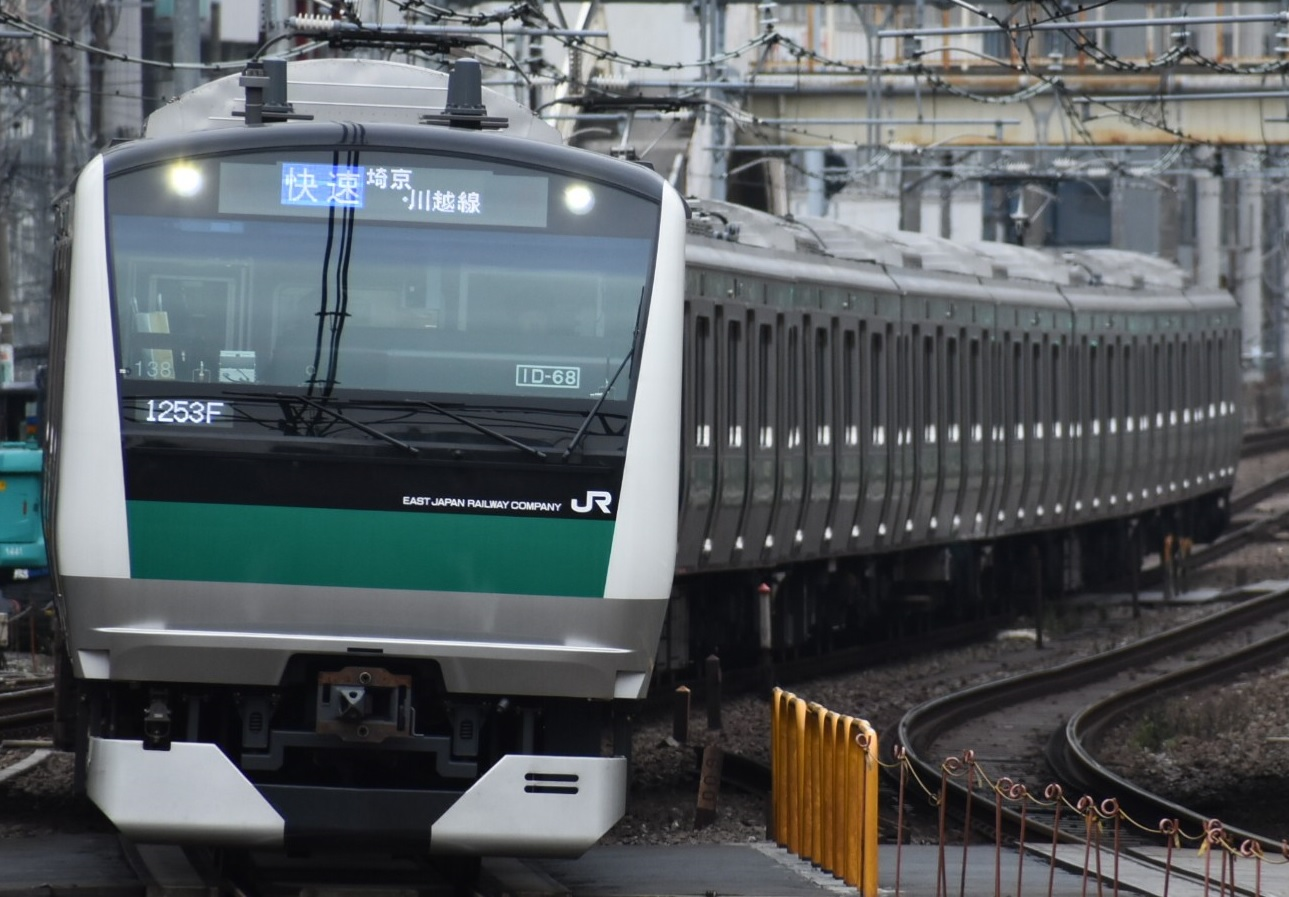 E233系7000番台宮ハエ138 @恵比寿－渋谷